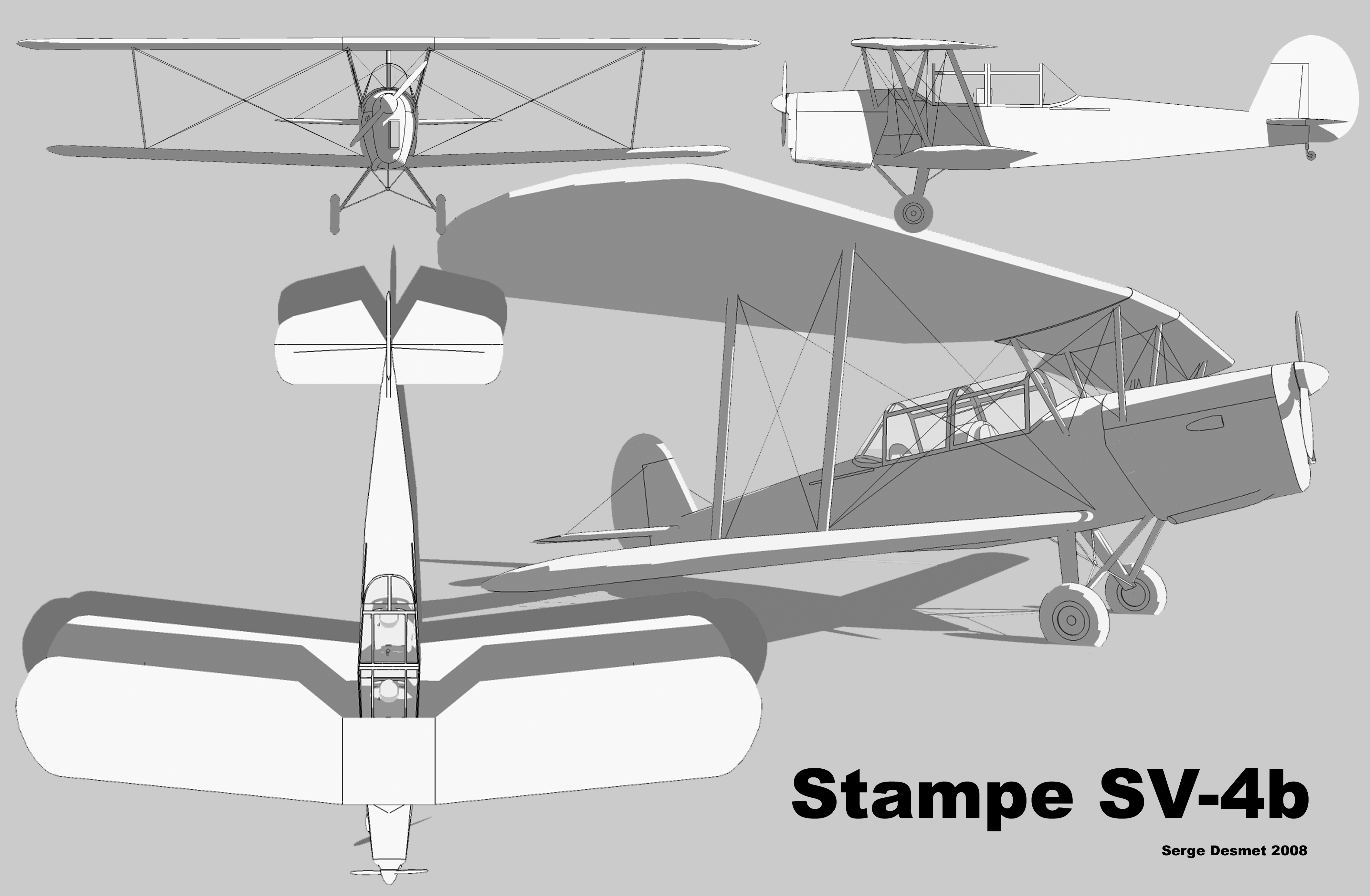 Plan 3 vues du Satmpe SV-4b